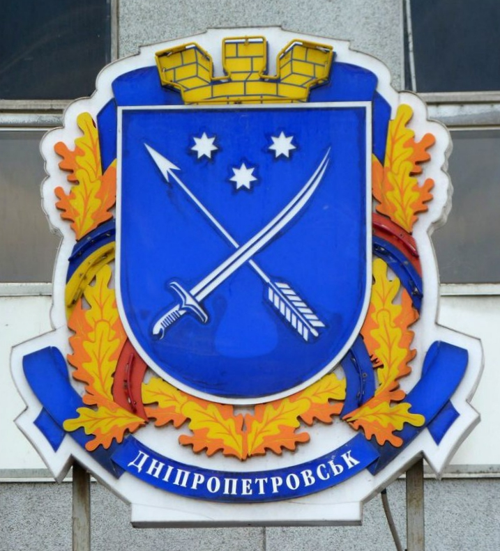 Herb Dniepropetrowska na budynku Rady Miejskiej